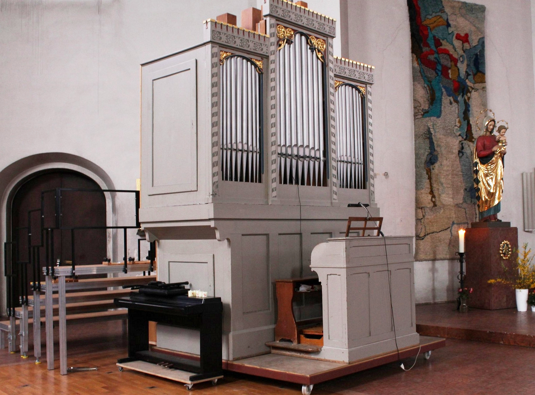 Chor-Orgel in St. Rupert in München (1907, F. B. Maerz, I/6, ursprünglich in St. Leonhard in Greimharting)